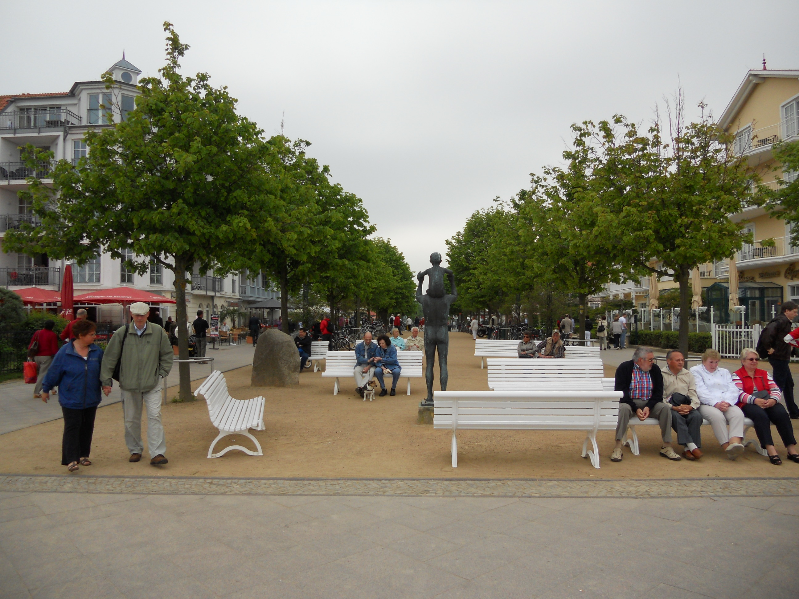 Bronze Vater und Sohn